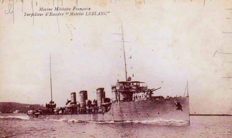 Torpilleur français Matelot Leblanc